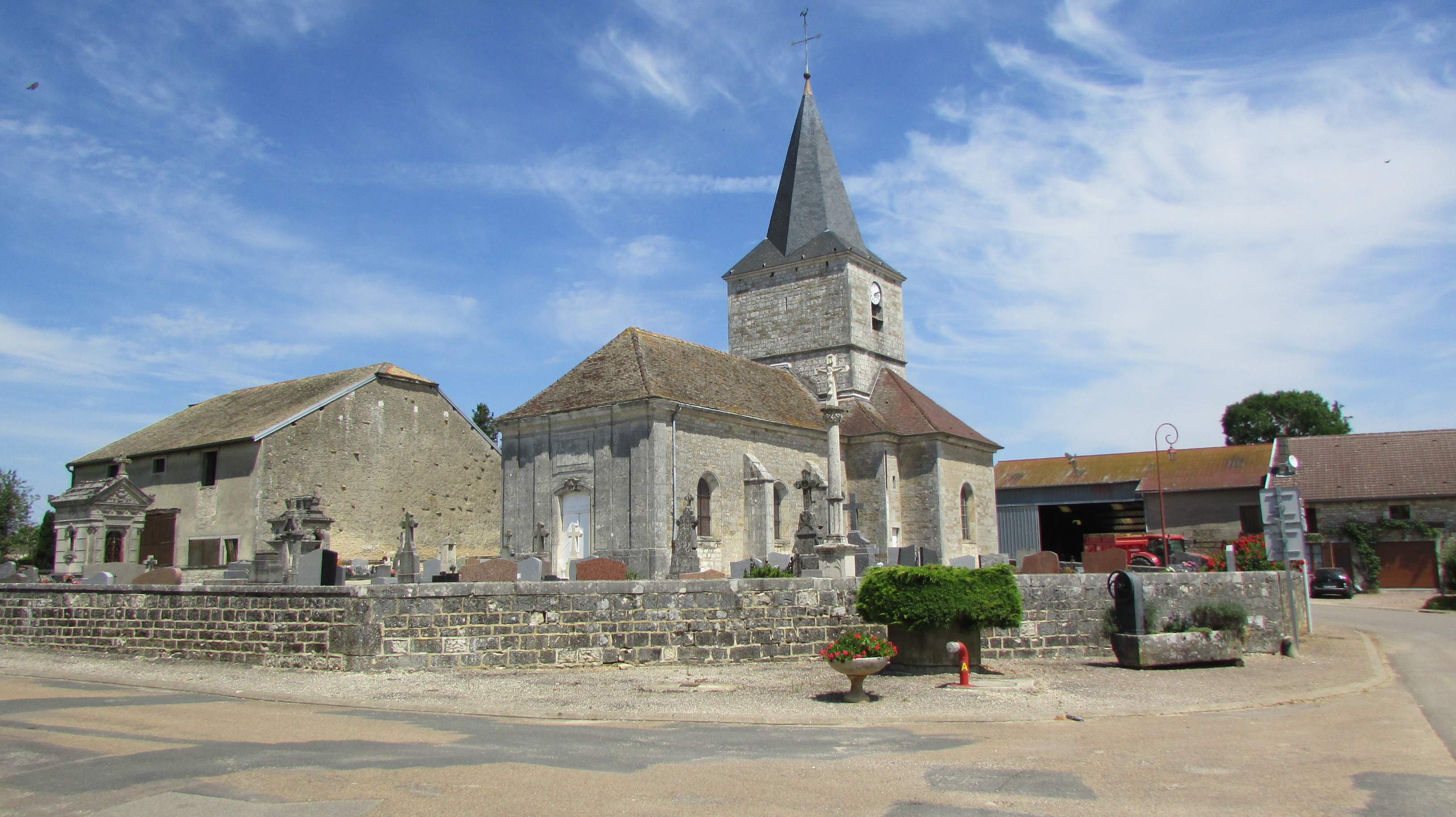 L'église de Mareilles, Haute-Marne